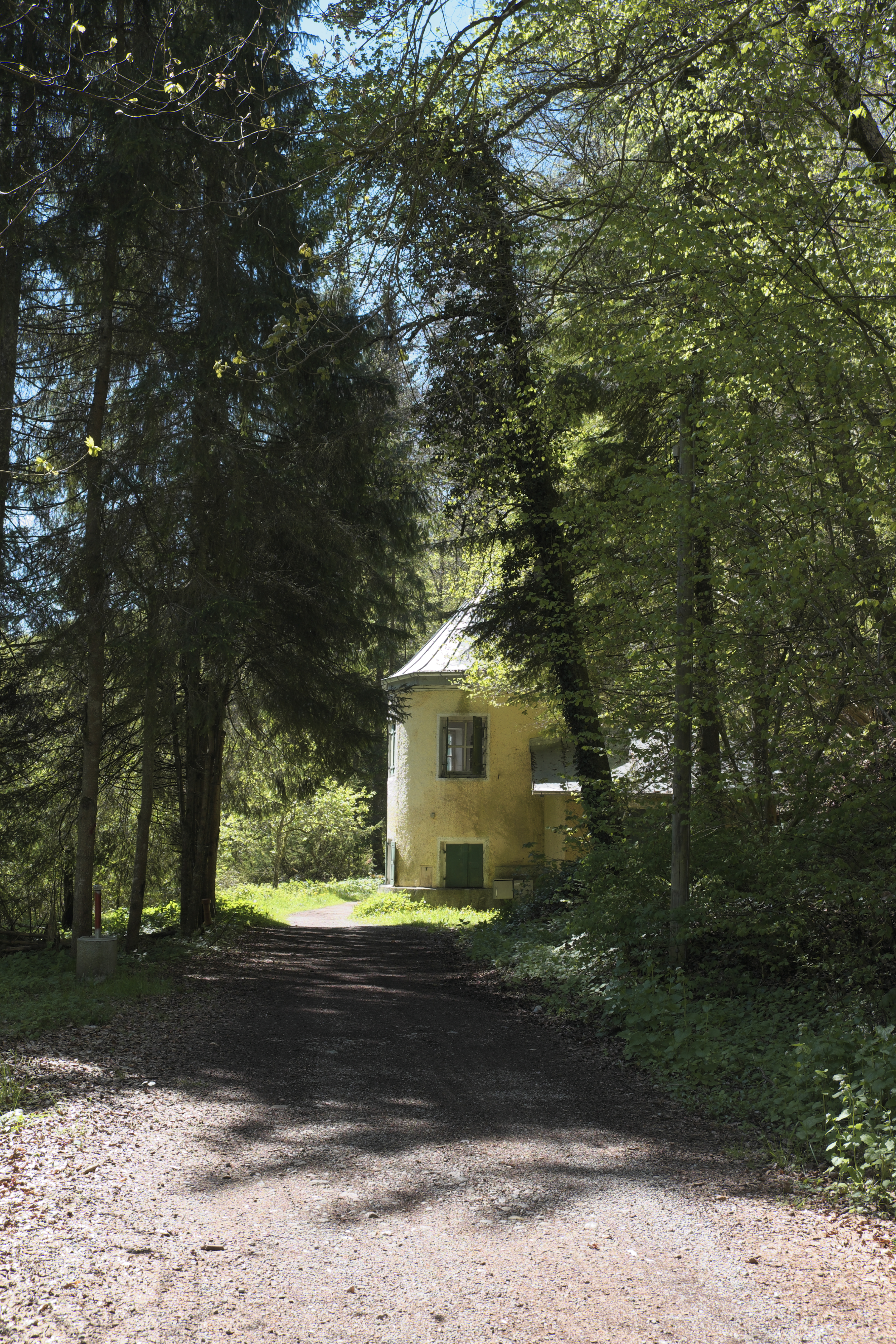 Haus zum Kapeller in Mühlthal in Starnberg im Landkreis Starnberg (Bayern, Deutschland)